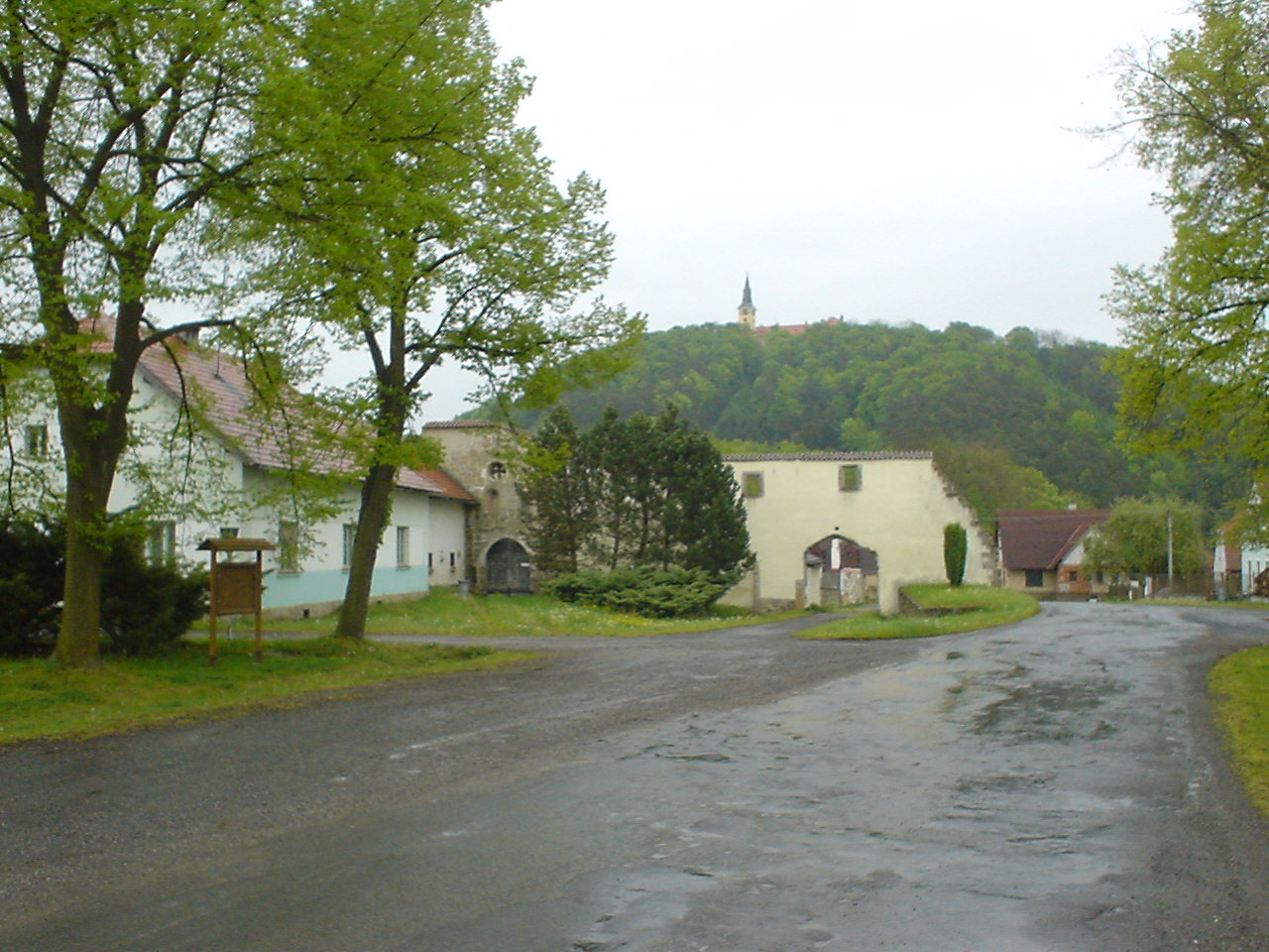 Kloster Nepomuk, Haus Nr. 39 in Klaster